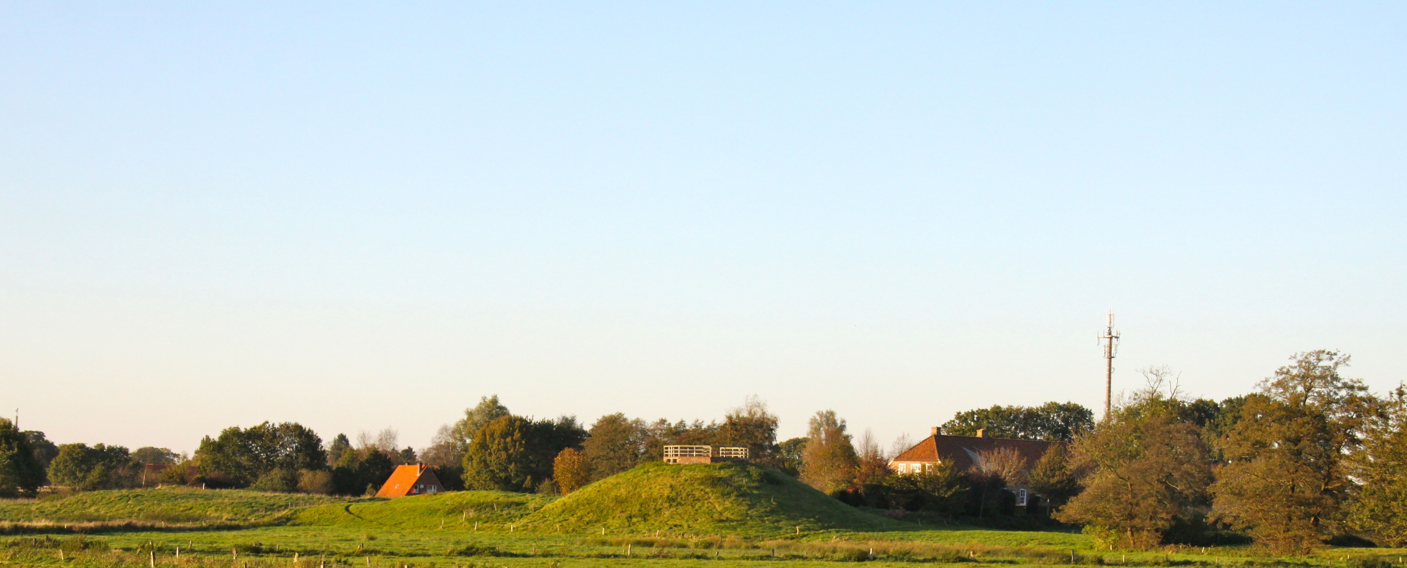 Reste der Wälle der Festung Friedeburg (Ostfriesland)